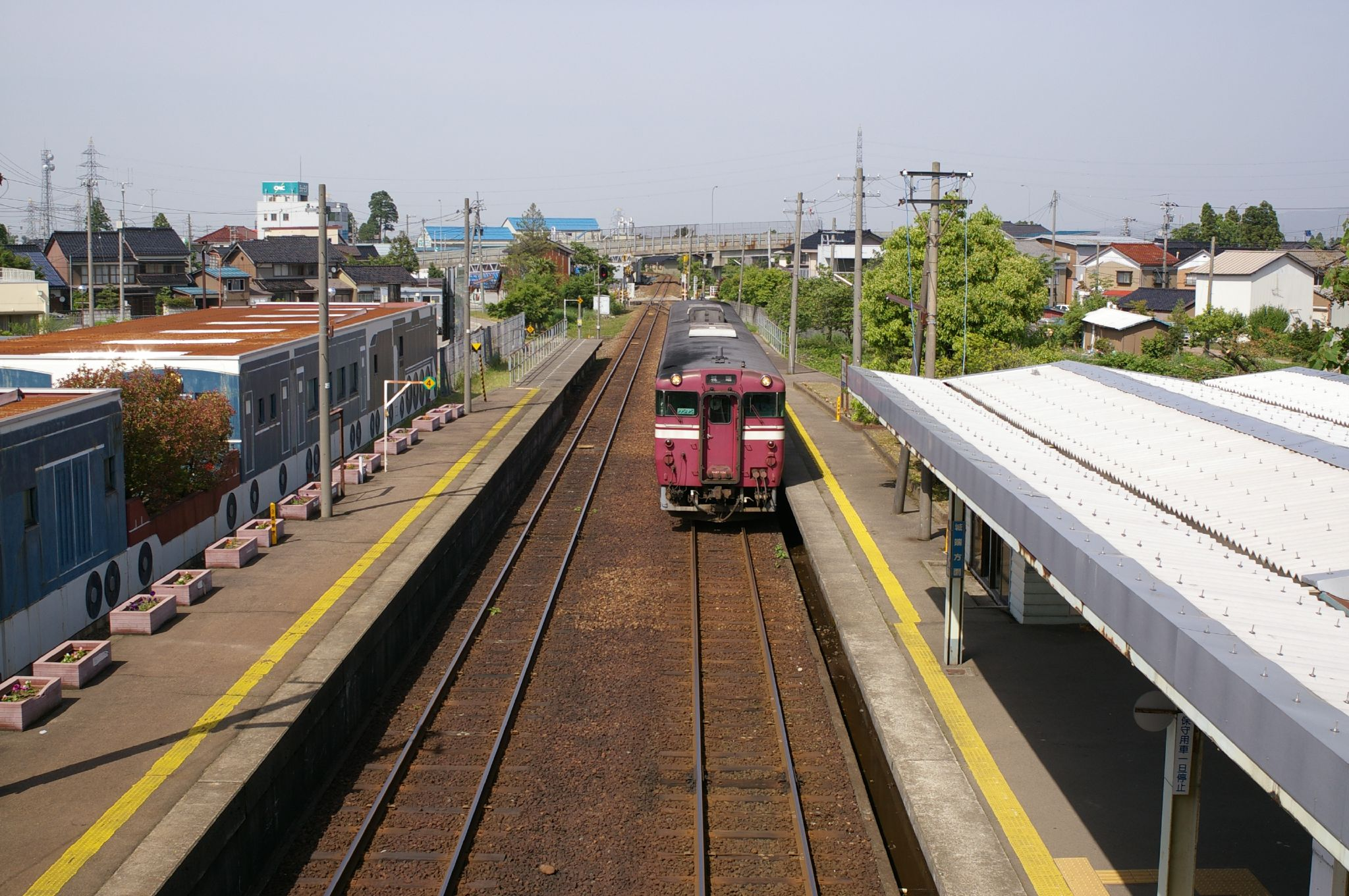 城端線福光駅